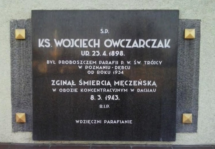 Kościół Św. Trójcy - Poznań-Debiec. Tablica ks. Owczarczaka.